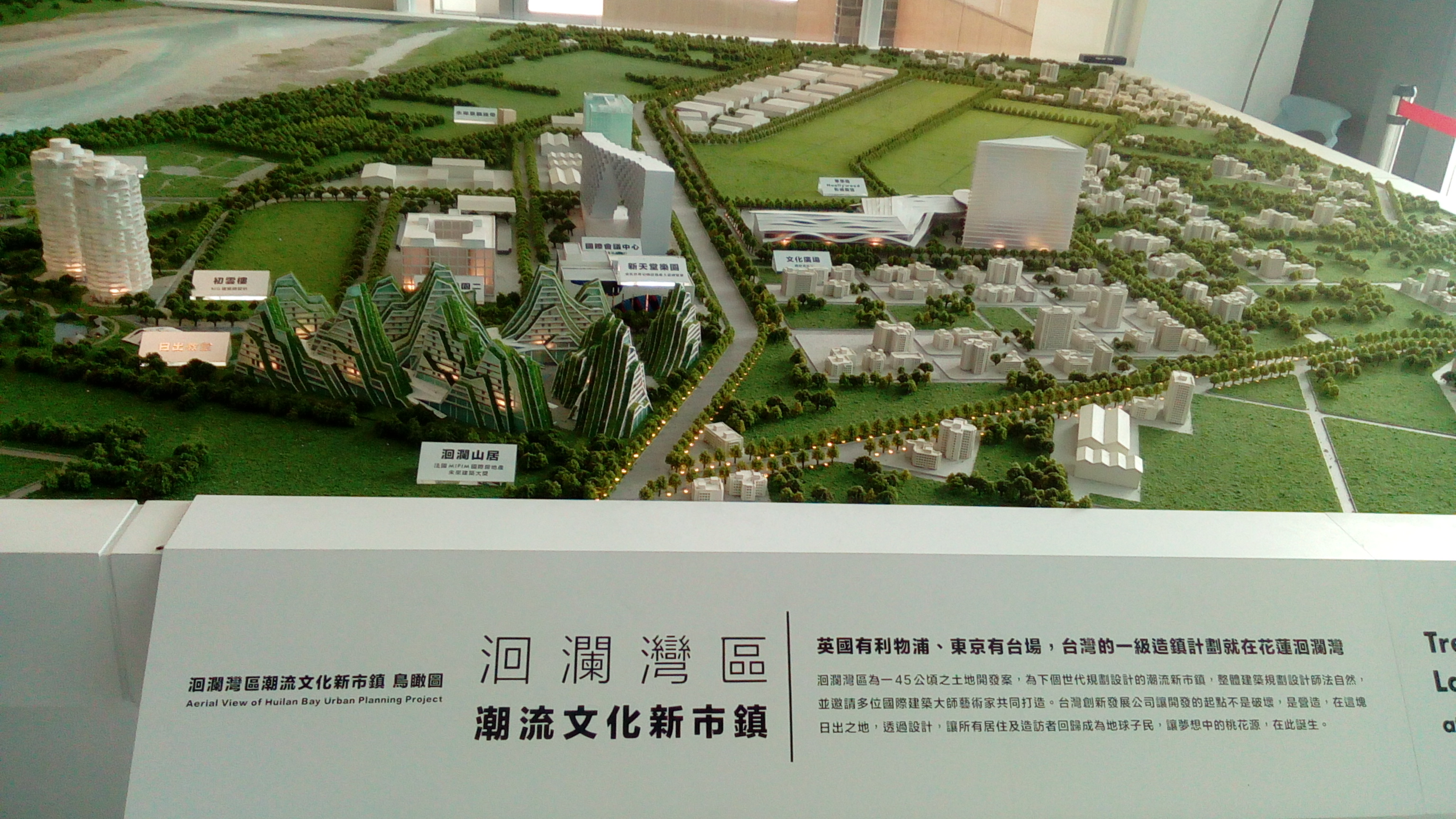 台開洄瀾灣區新市鎮遠景模型 位於新天堂樂園1樓展示區